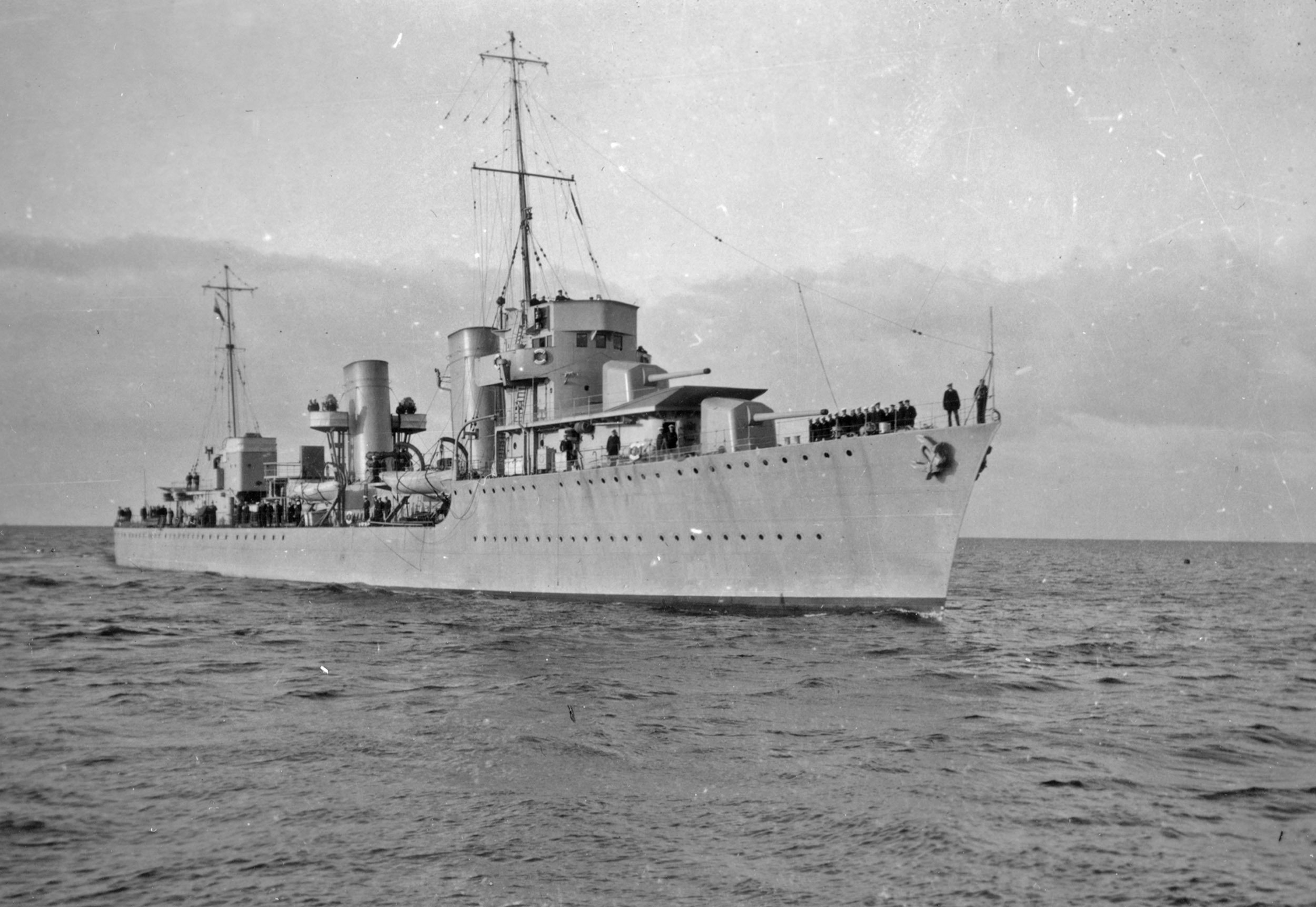 Југословенски разарач Дубровник Description Yugoslavian destroyer DubrovnikDate May 1932Source Russian magazine Морская Кампания 2017 №1 (65) Югославские эсминцы второй мировойAuthor Royal Yugoslav Navy Yugoslavian destroyer Dubrovnik